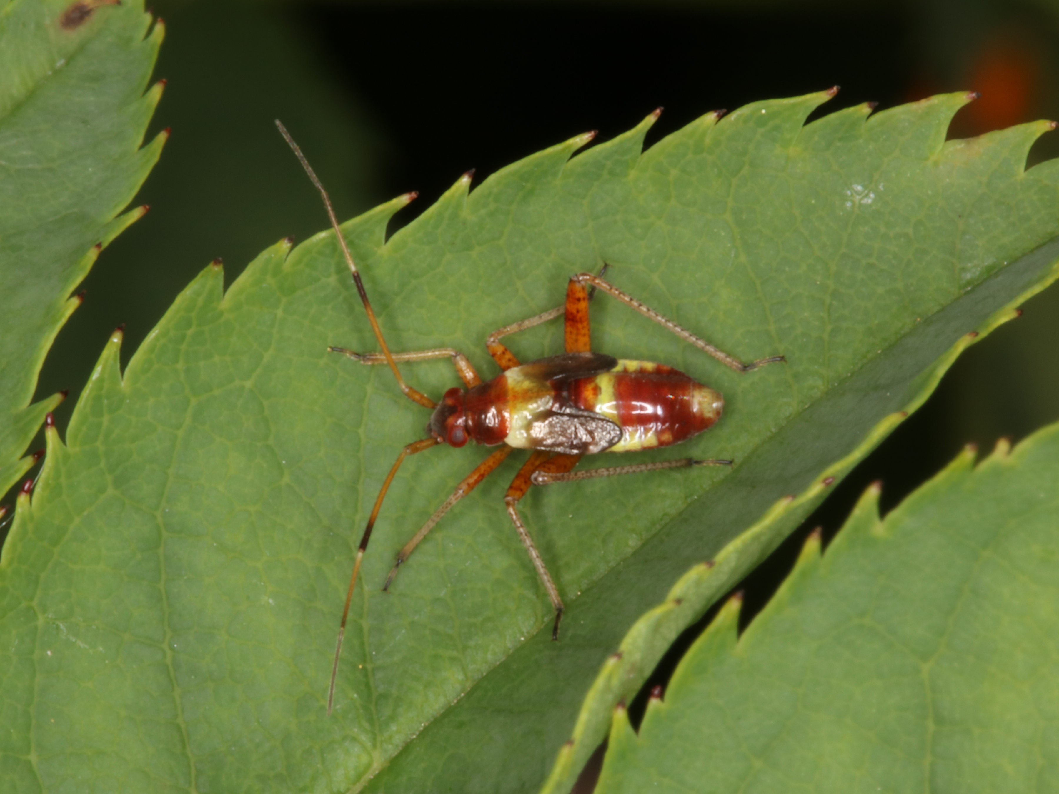 Closterotomus fulvomaculatus (De Geer, 1773), nymph, Søborg, Denmark, 20 June 2015